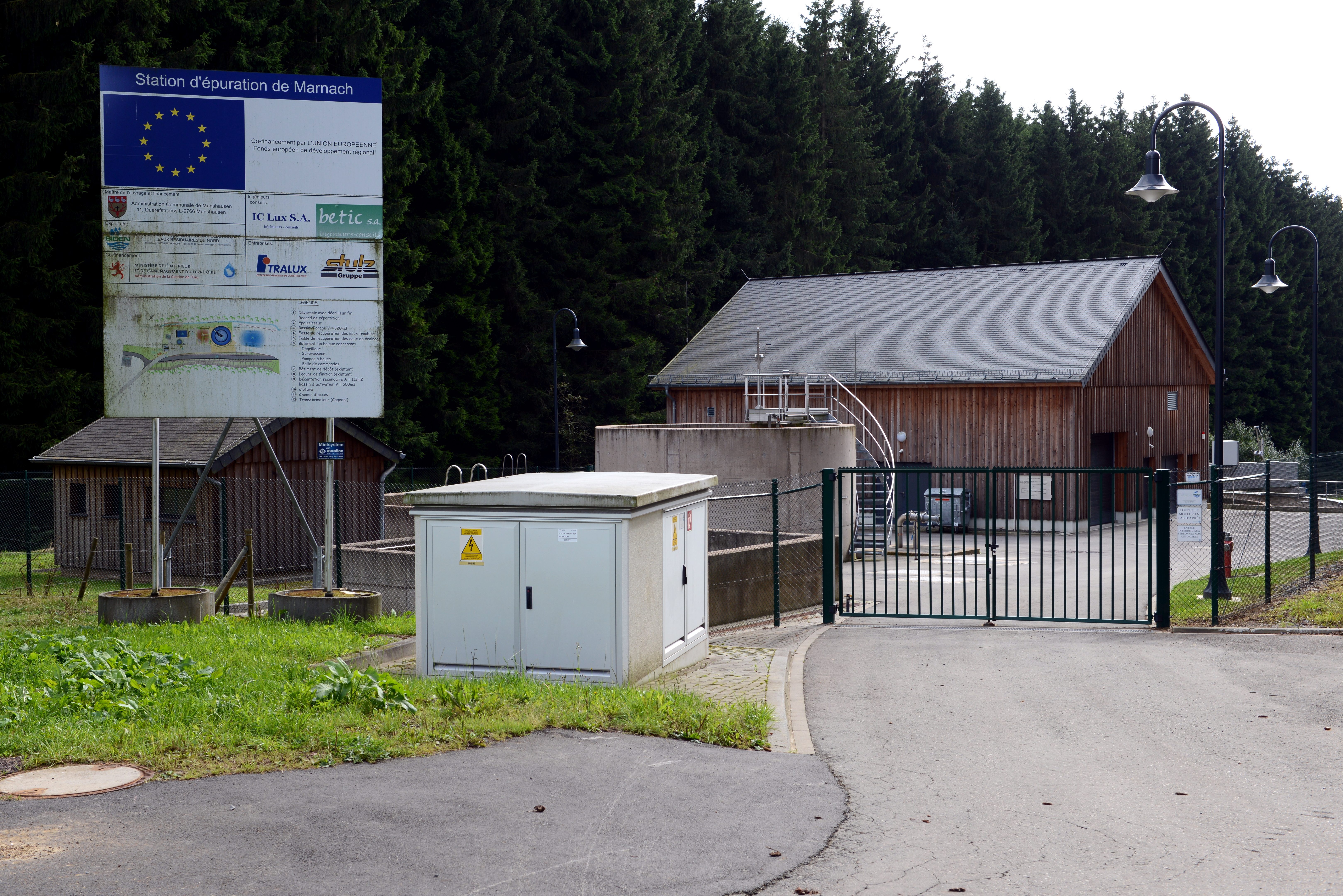 D'Kläranlag zu Maarnech.